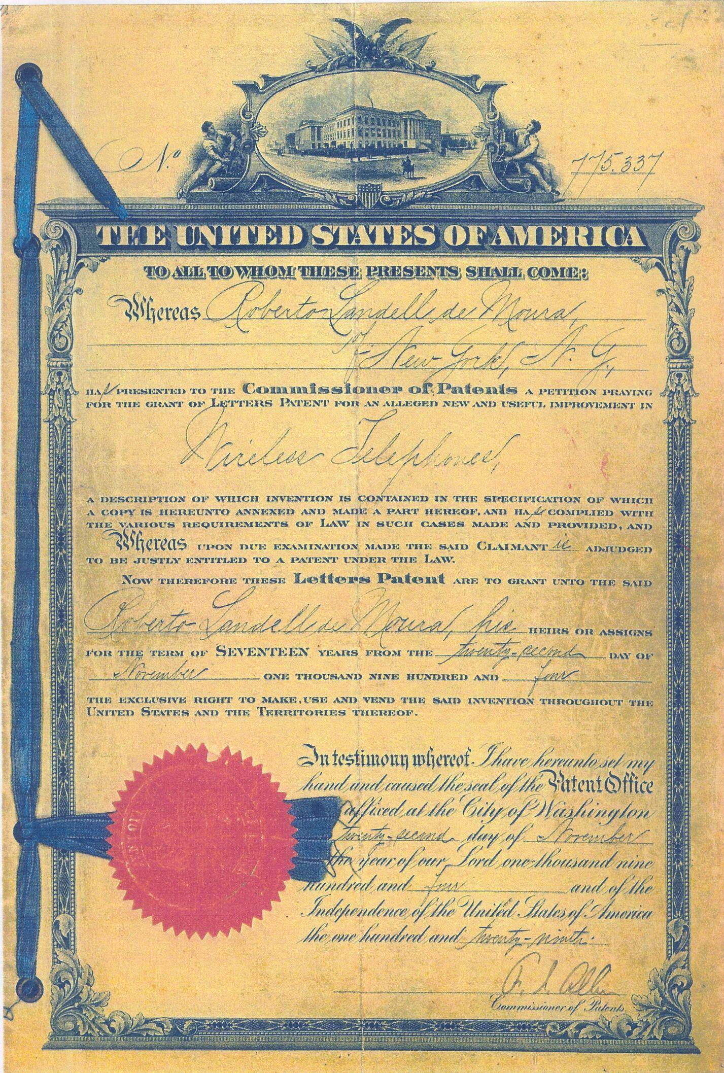 Patente do "Wireless Telephone" - Telefone Sem Fio, obtida no Departamento de Patentes nos Estados Unidos, em 22 de Novembro de 1904.